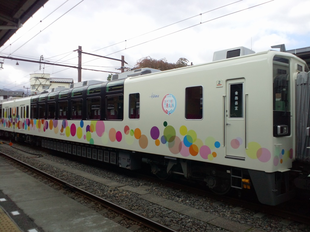 東武鉄道634型「スカイツリートレイン」 モハ634-21 2012年10月27日 東武日光駅にて撮影